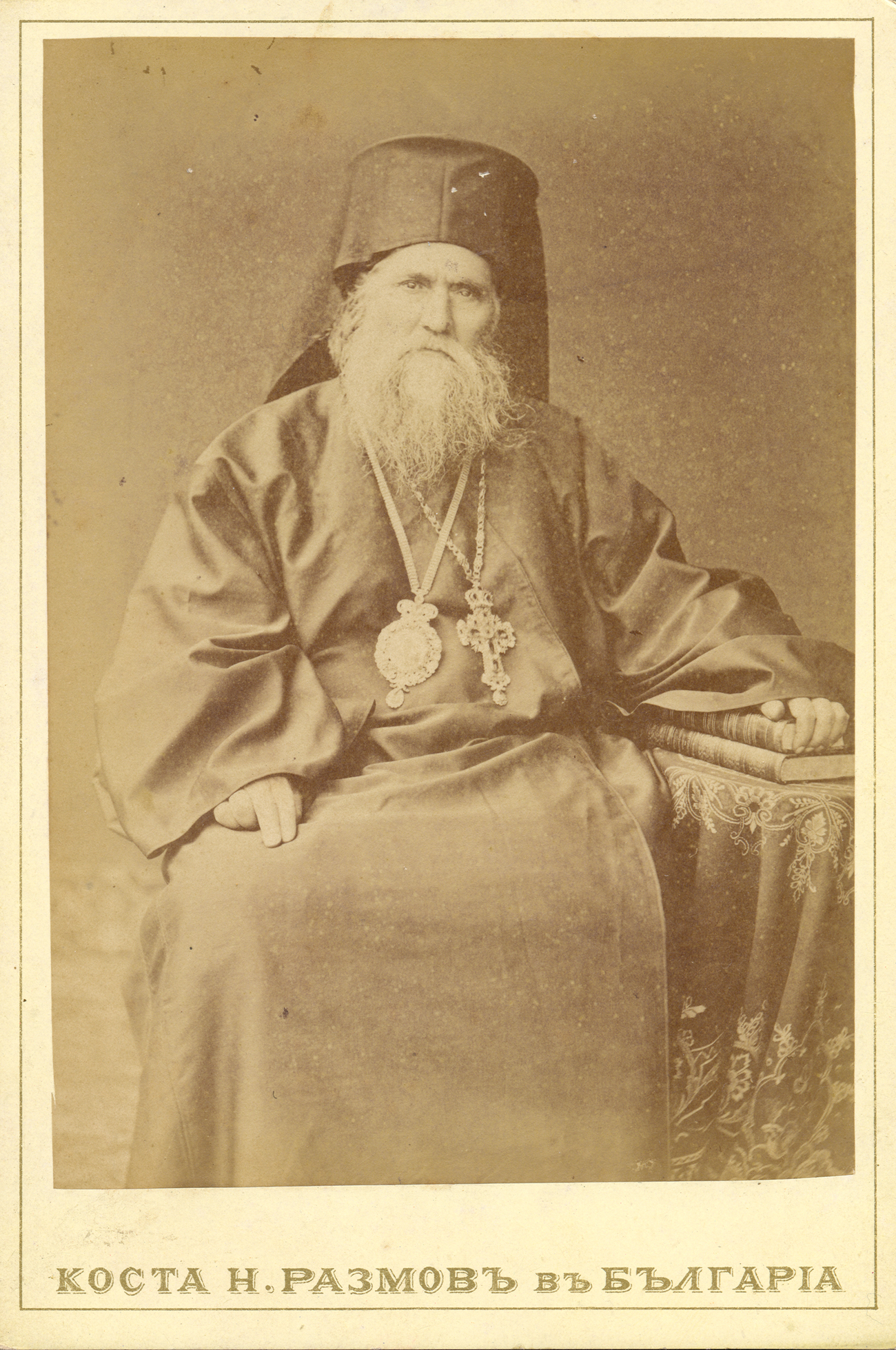 Антим І Български